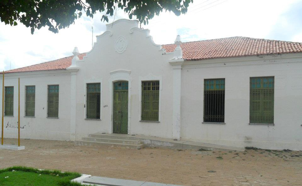 Museu Ozildo Albano.